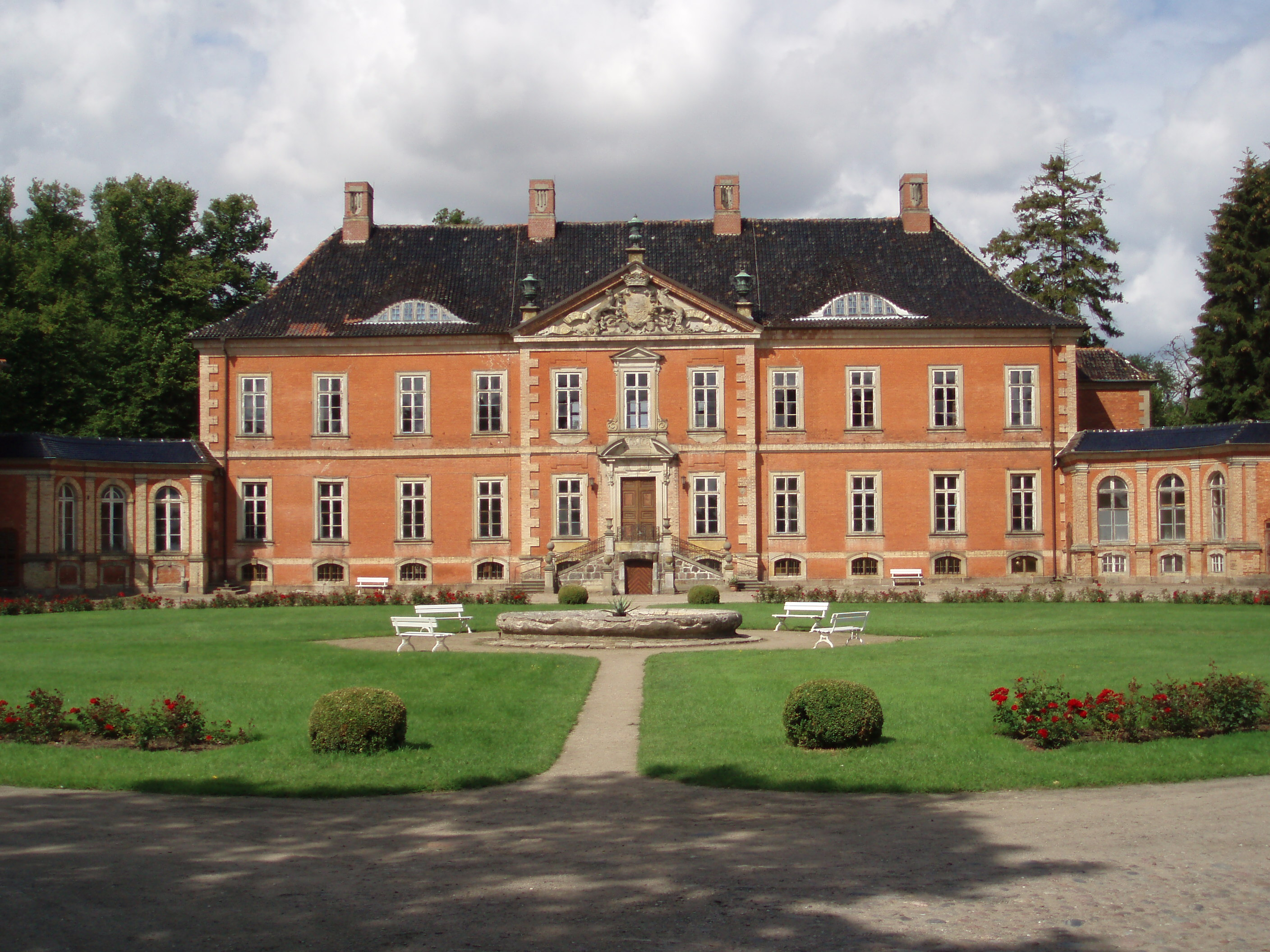 Schloss Bothmer: Hauptgebäude